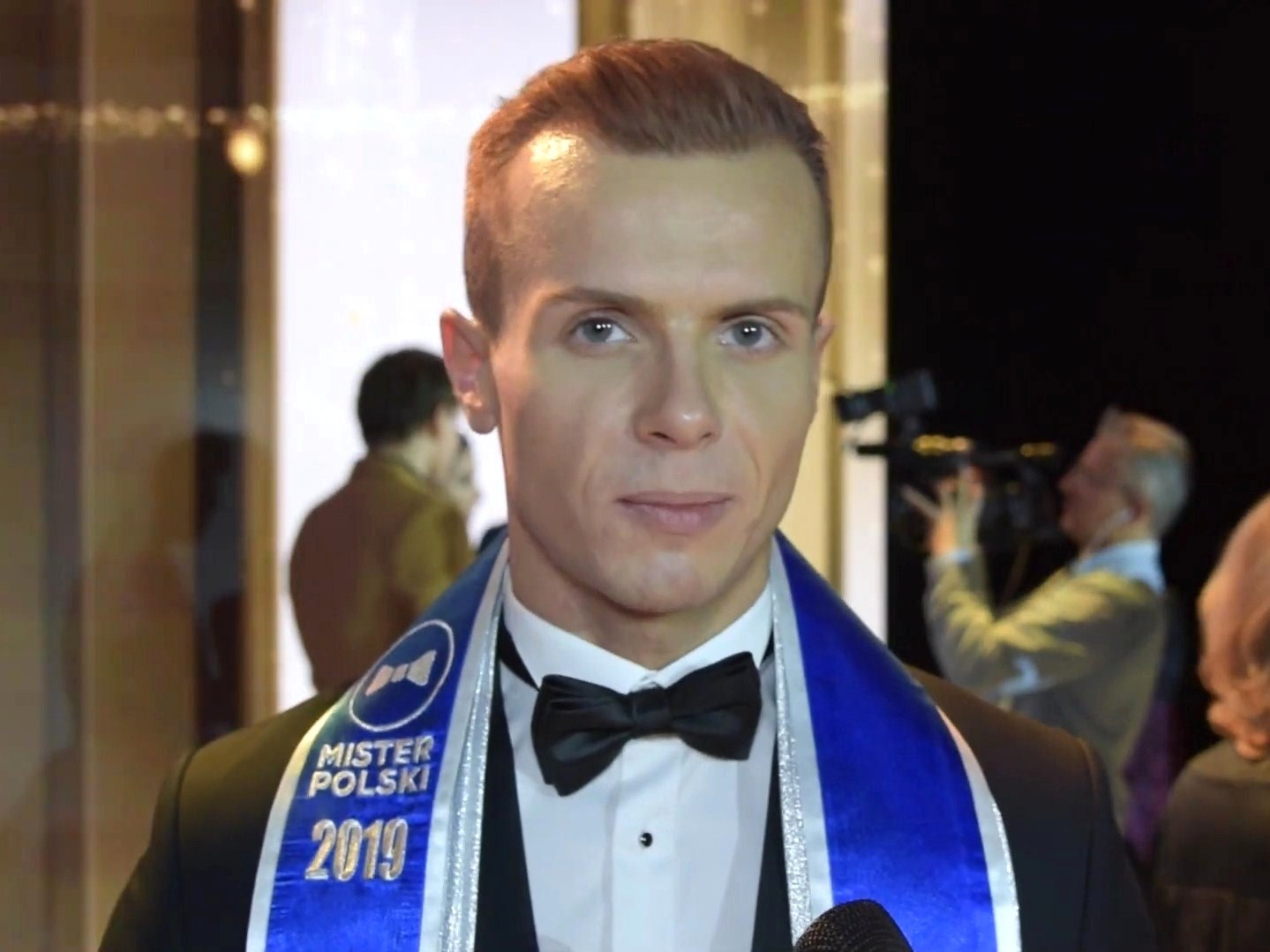 Daniel Borzewski, Mister Polski 2019.